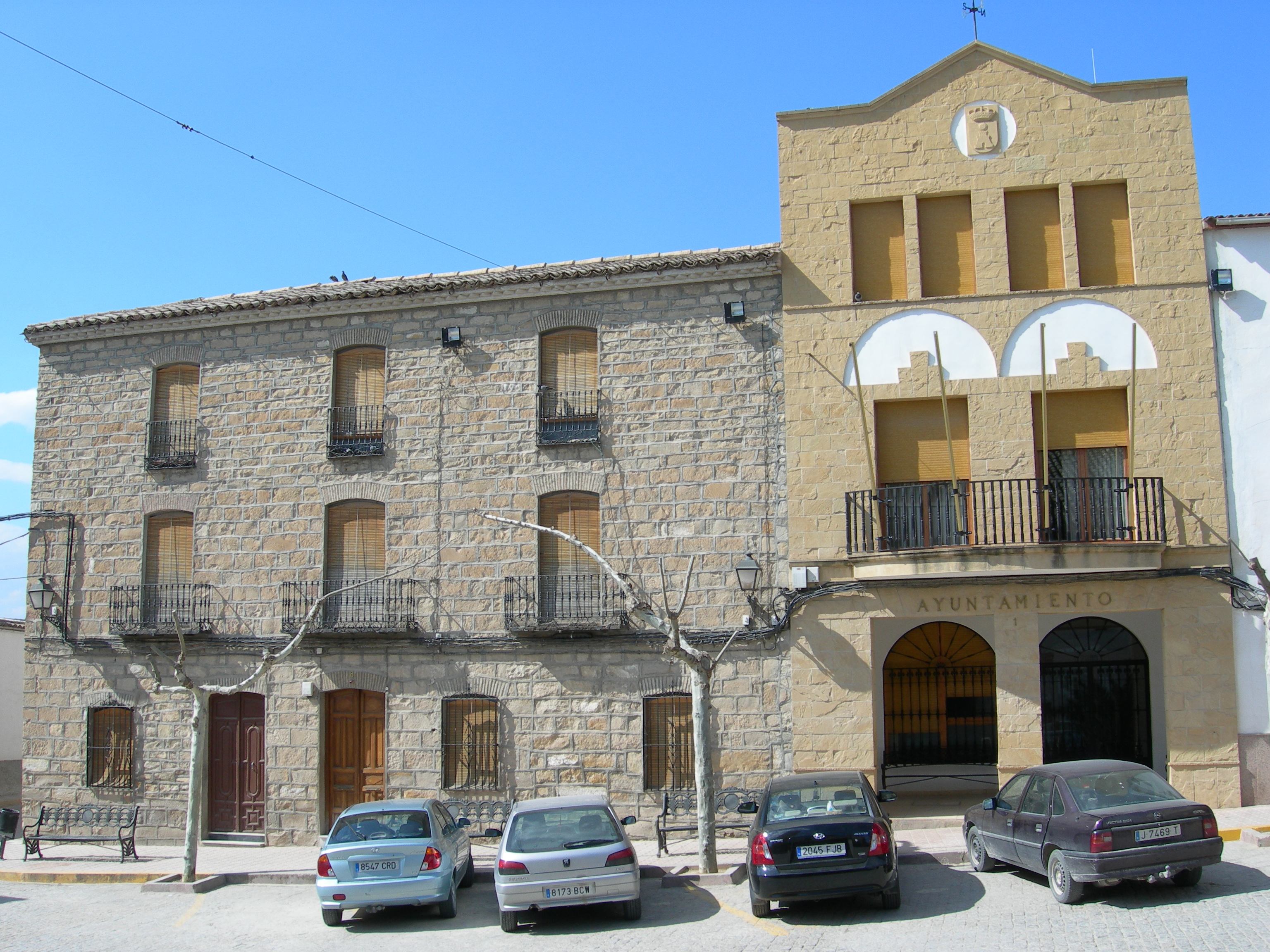 Fachada del Ayuntamiento de Cazalilla (Jaén)